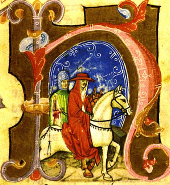 Fülöp fermói püspök